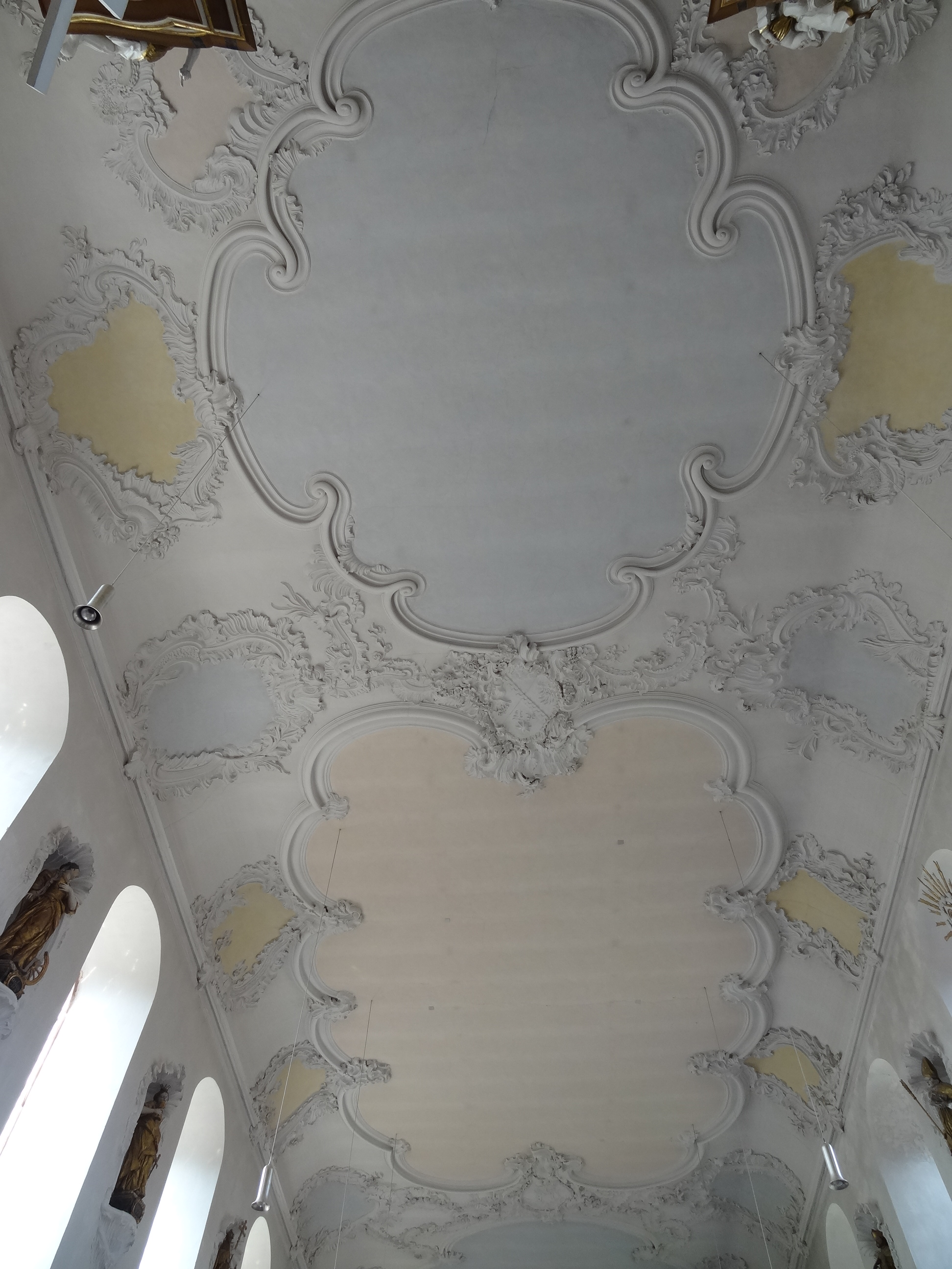 Klosterkirche (JVA Rockenberg)